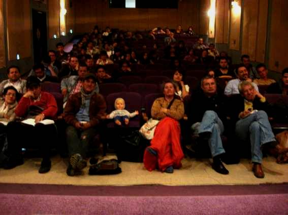 Asistentes a un auditorio escuchando una disertación académica en Bogotá-Colombia, año 2011.En primera fila puede observarse una mujer junto a su muñeca. Cuando el disertante preguntó por este asunto a los encargados de la sala de conferencias, se le indicó que esa mujer era conocida, ya que con alguna frecuencia asistía a actividades académicas de todo tipo, siempre acompañada por su muñeca, a quien llevaba –decía– para que fuera aprendiendo (manifestando así algún tipo de trastorno mental, muy posiblemente esquizofrenia) En realidad y en el terreno de las hipótesis, el caso podría tratarse también de una neurosis histérica; también podría ser algún tipo de actriz o artista realizando un "happening", o sea una "intervención social de impacto", tal vez con fines de propaganda de una obra de teatro o de una película, que se pudiera estar promocionando justo en esos momentos a nivel local.